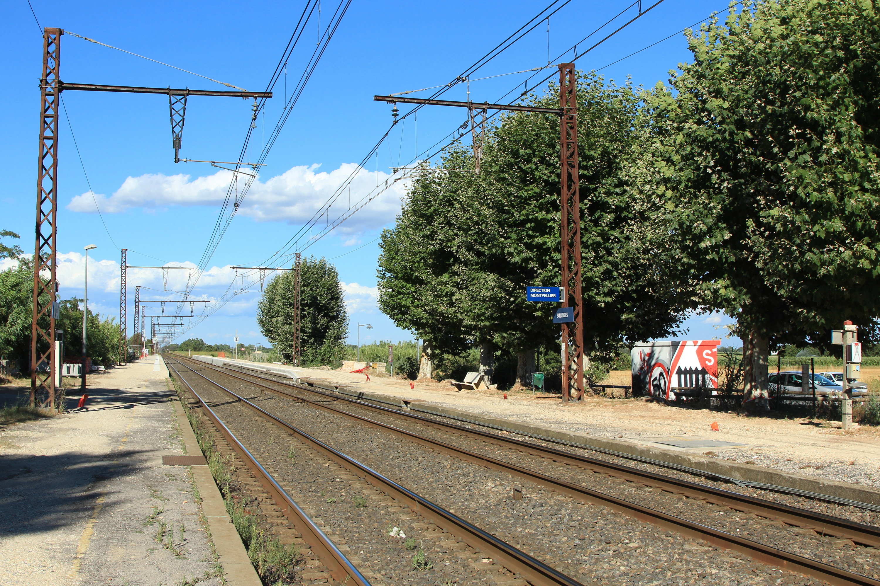 Vue des voies et quais de la gare de Baillargues, en direction de Nîmes et Marseille.